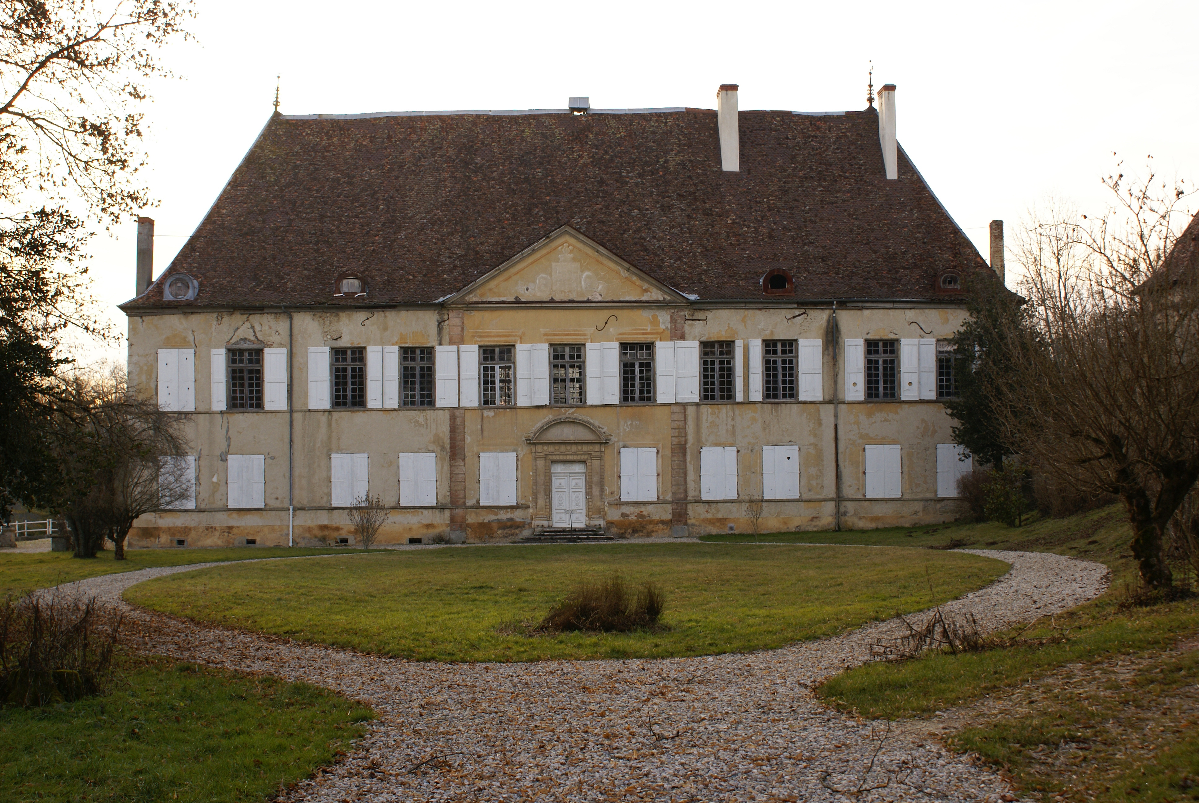 Château du Village de Le Passage